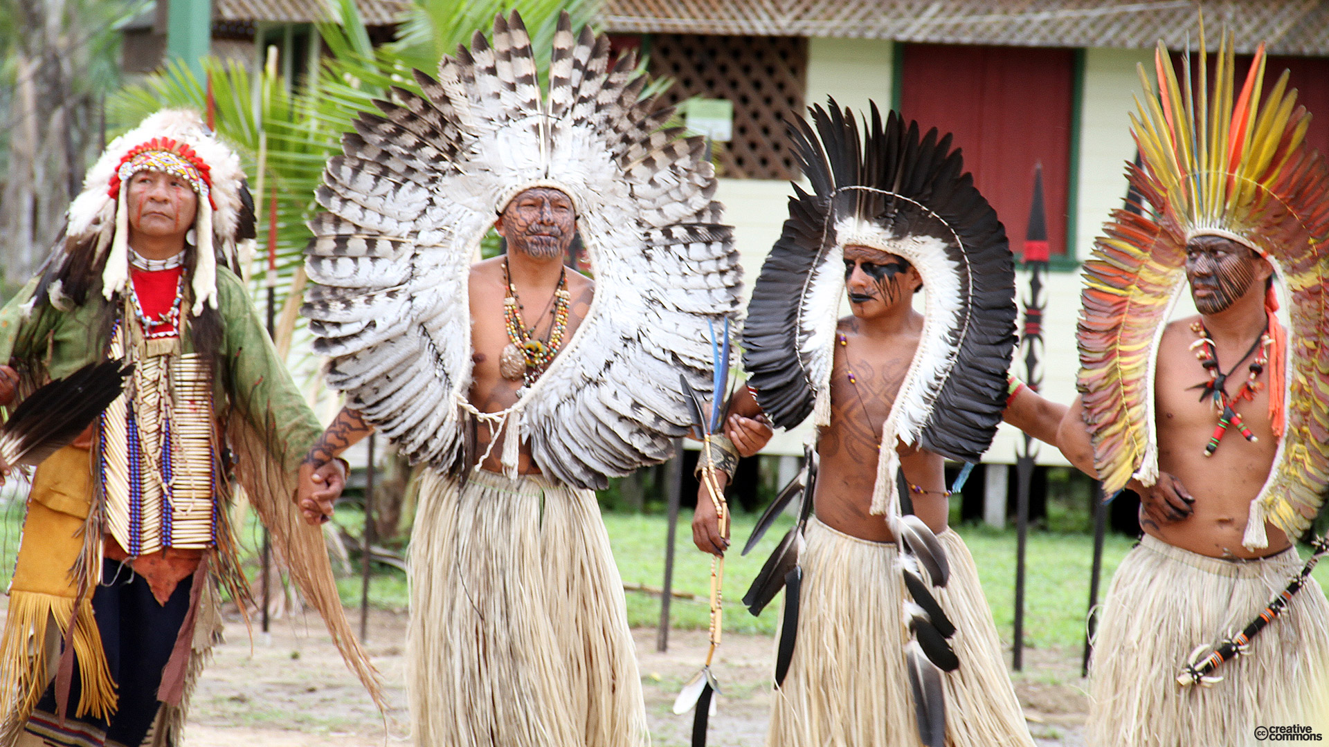 Retalhos do 9 Festival da Cultura Yawanawa. Brasil-Acre-Amazônia-Rio Gregório.